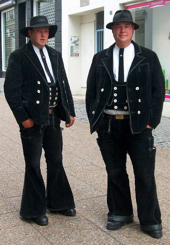 to navere på gågaden i Århus